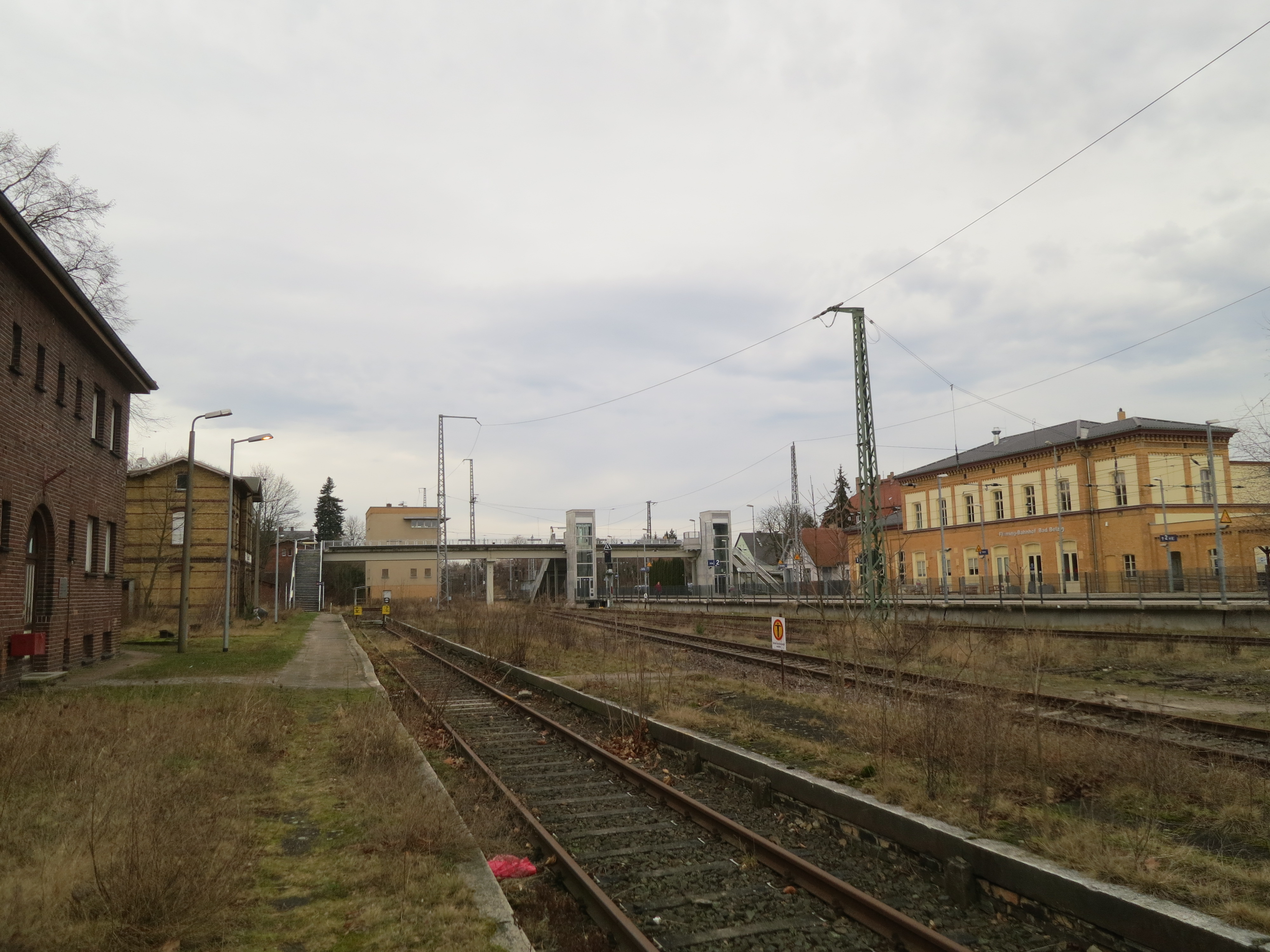 Bahnhof Bad Belzig, Blick vom Städtebahnteil über die Gleise zum Staatsbahngebäude